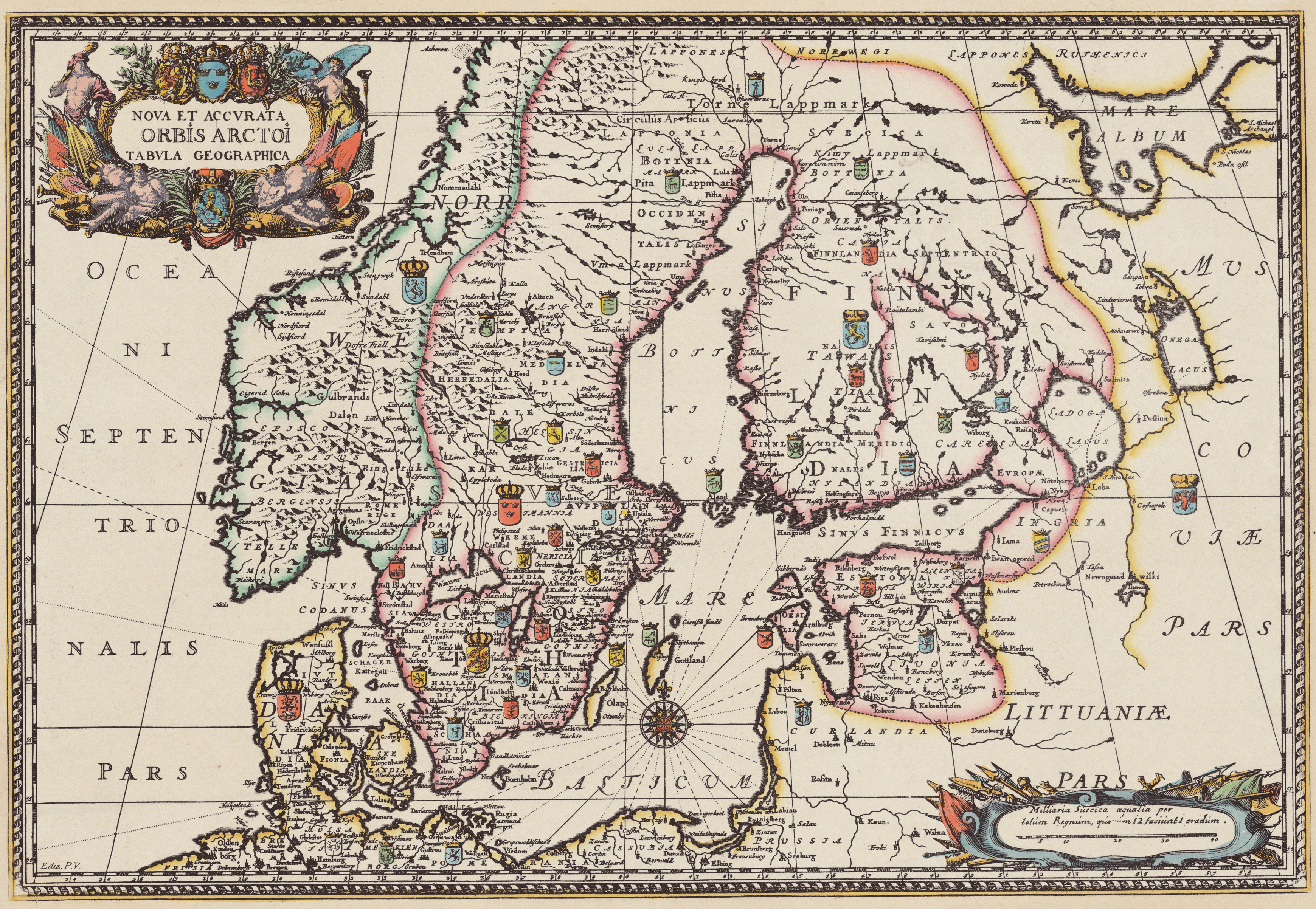 Nova et accvrata orbis arctoi tabvla geographica Published in: Suecia antiqua et hodierna. Copper engraving, ca 1:6 300 000, 36 x 25 cm.